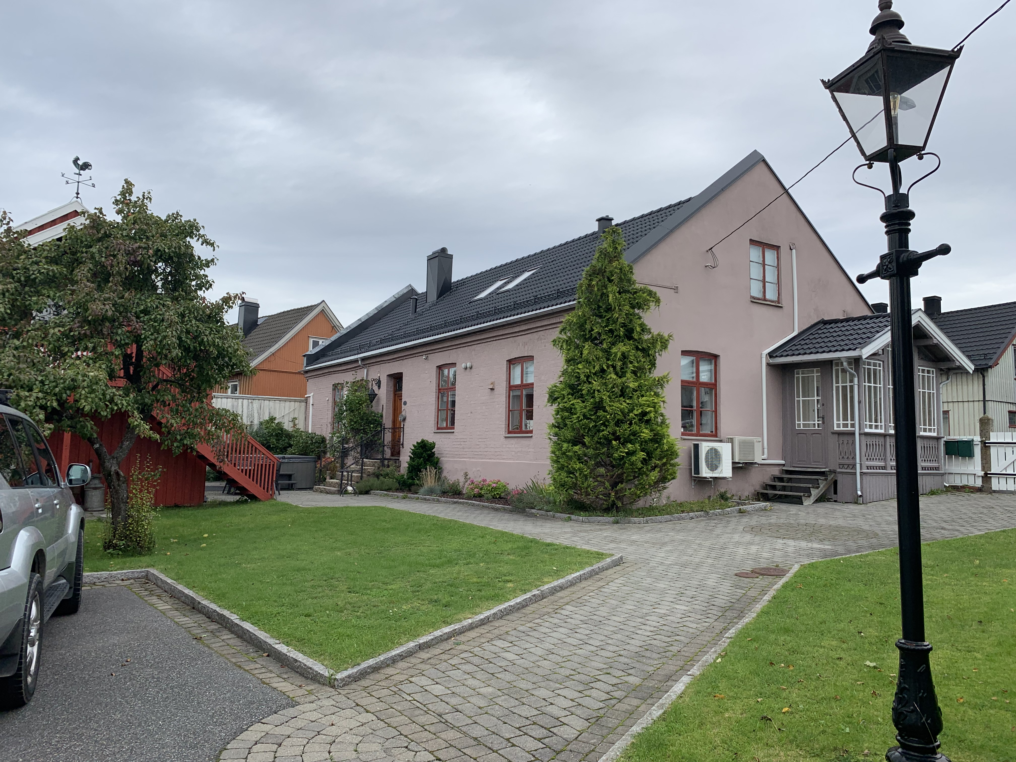 Et bilde av huset (2019)